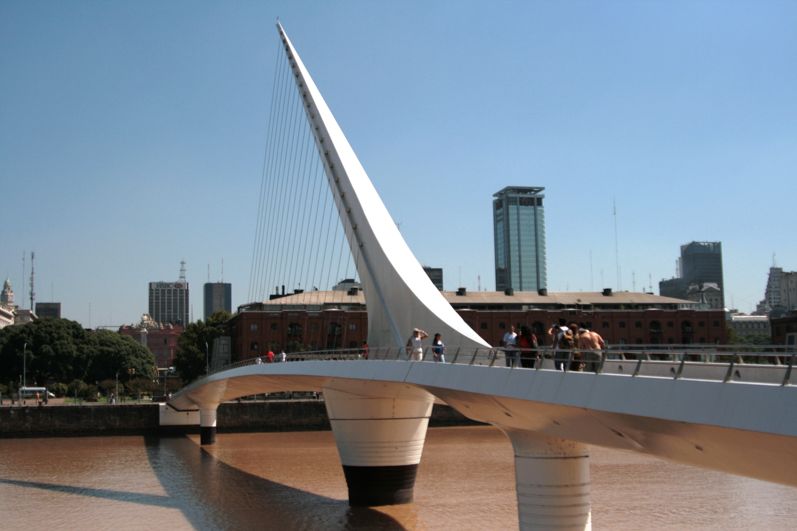 Santiago Calatrava's "Woman's Bridge" (Buenos Aires).